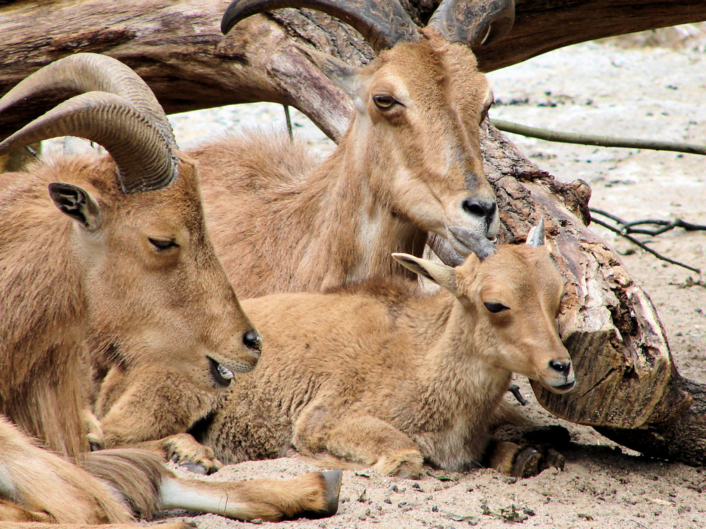 Tier im Zoologischen Garten Berlin